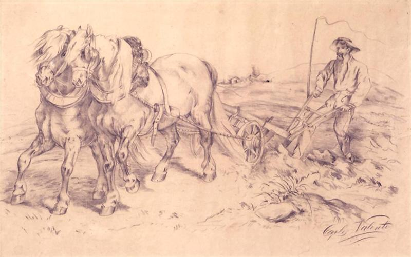 lápiz sobre papel